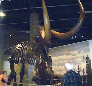 Mastodon skeleton in museum in Bismarck, North Dakota.